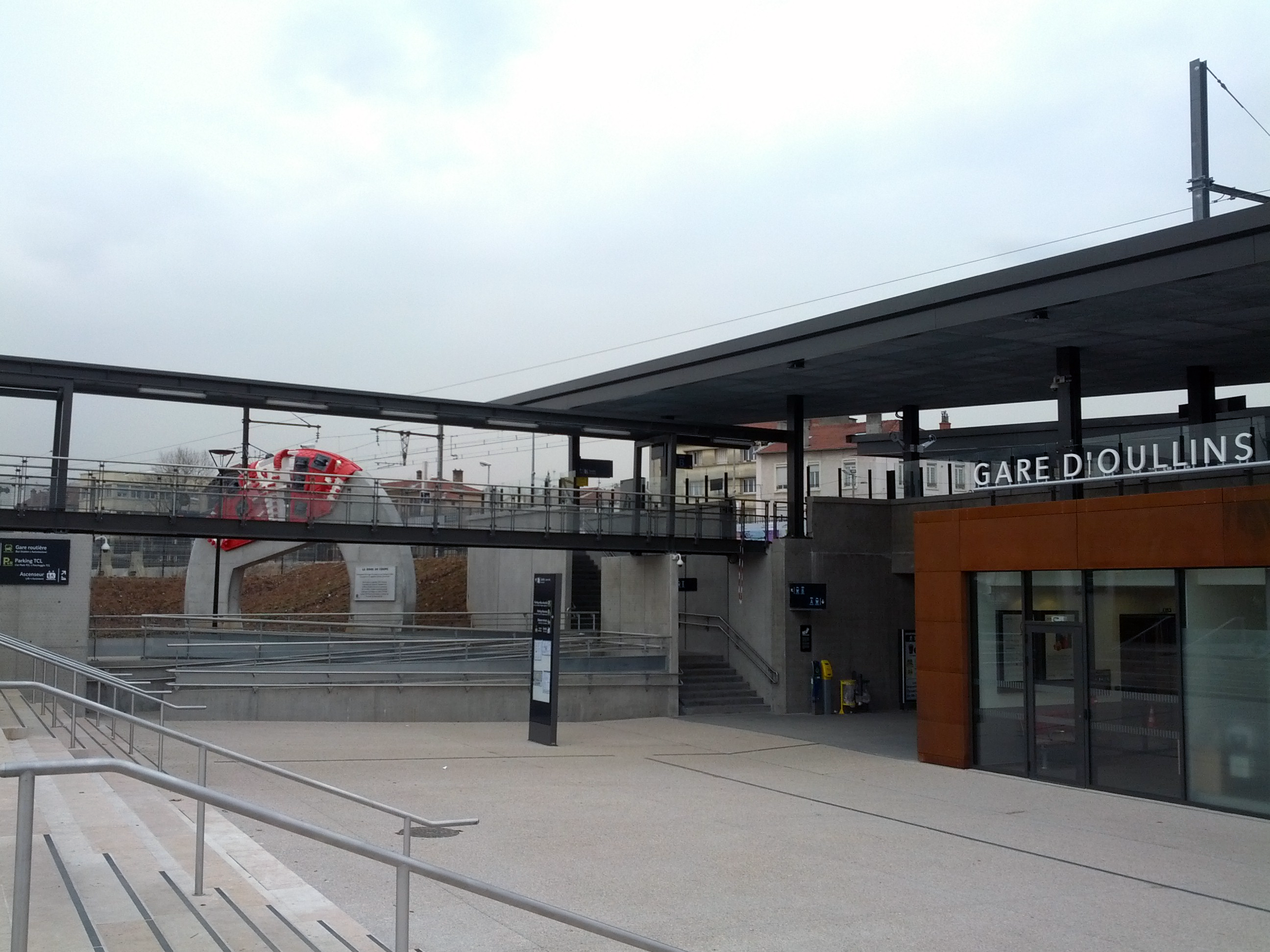 Vue de la passerelle entre la station du métro B de Lyon "Gare d'Oullins" et la gare du même nom. En arrière plan on peut observer le "bouclier de forage" du tunnelier qui a creusé le prolongement du métro sous le Rhône, jusqu'à Oullins.